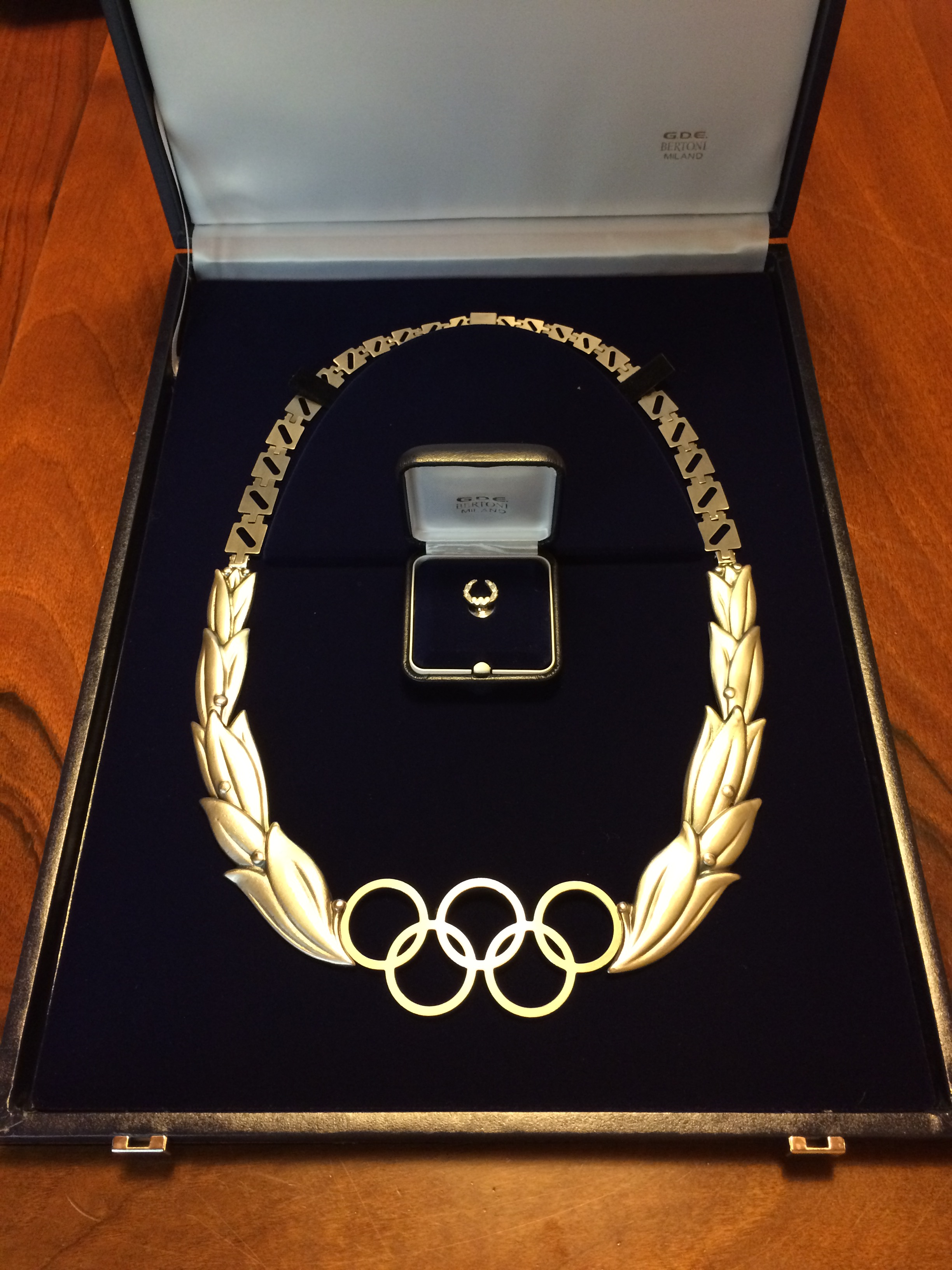 Ordine Olimpico, collare d'argento e relativa spilla da giacca, prodotti da GDE Bertoni Milano, property of Fabio Ferrari